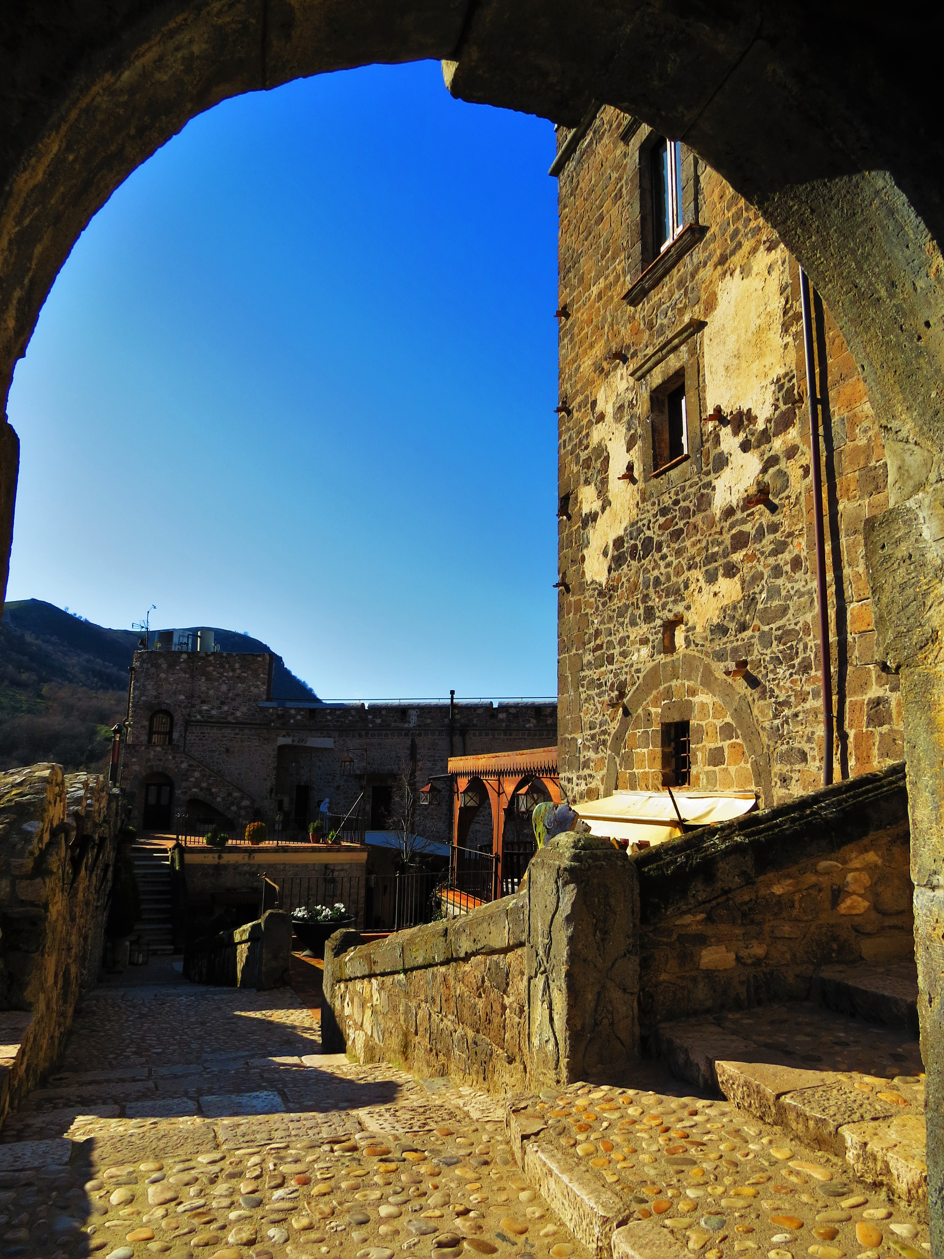 Limatola